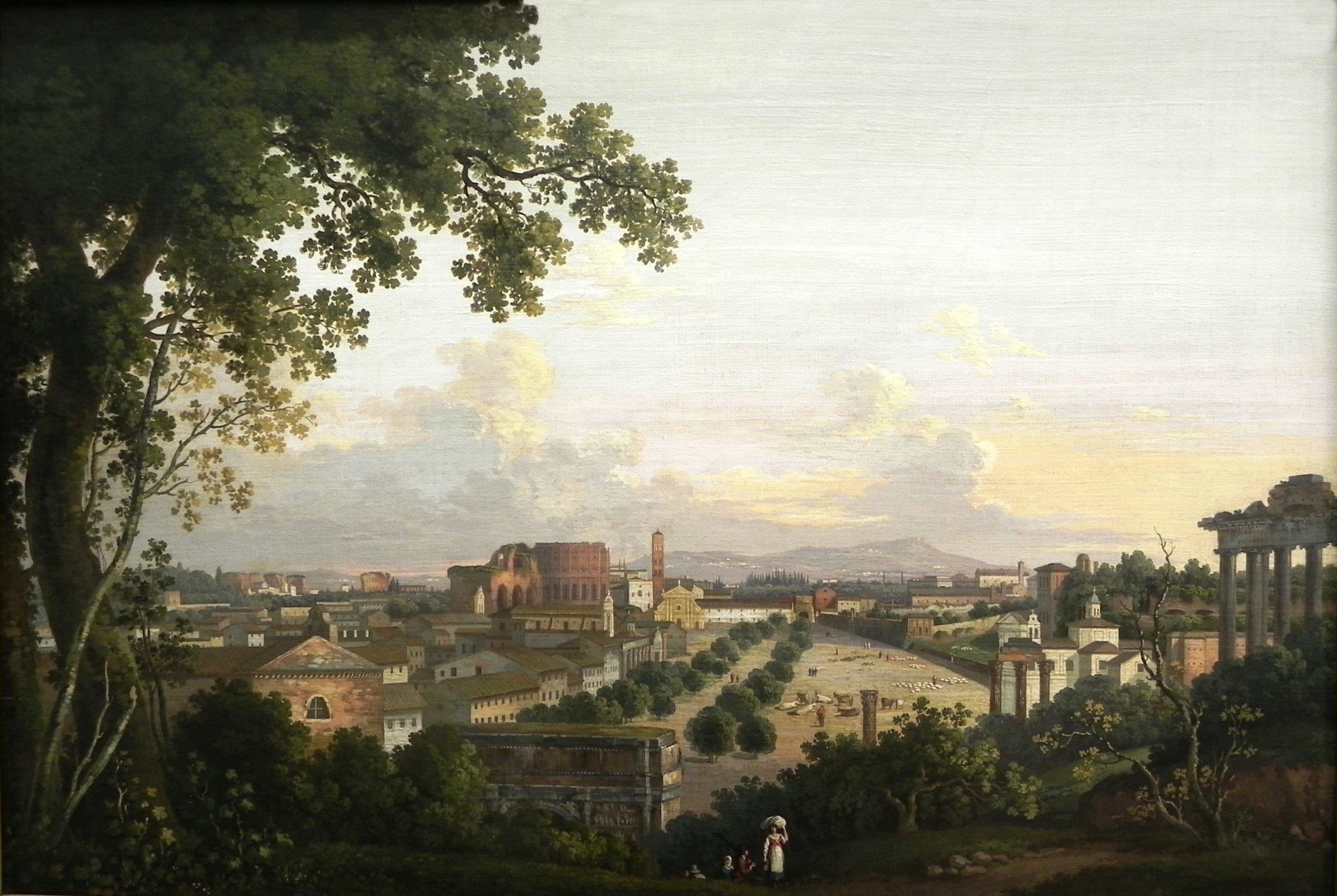 Das Forum Romanum vor der Ausgrabung. Die ersten umfangreichen Ausgrabungen fanden erst zwischen 1803 und 1818 statt. Die Sicht geht vom Abhang des Kapitols, rechts der Tempel des Saturn, vorn der Bogen des Septimius Severus - Blick auf den Platz der Senatoren. Hinten links das Colosseum, im Hintergrund die Albaner Berge.